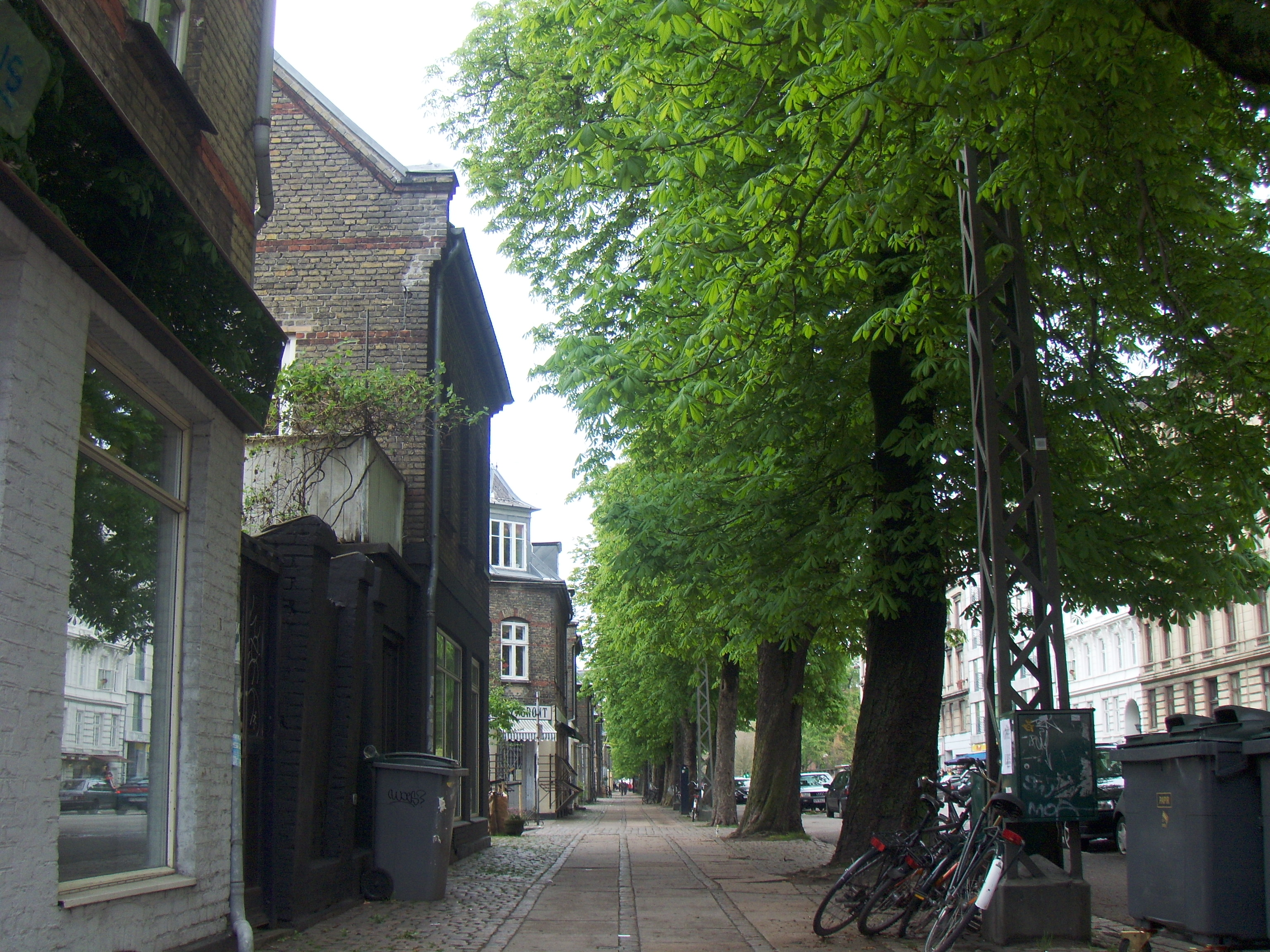 Øster Farimagsgade at Kartoffelrækkerne in the Østerbro district of Copenhagen, Denmark